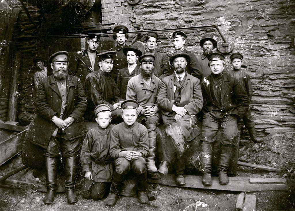 История завода Бисер